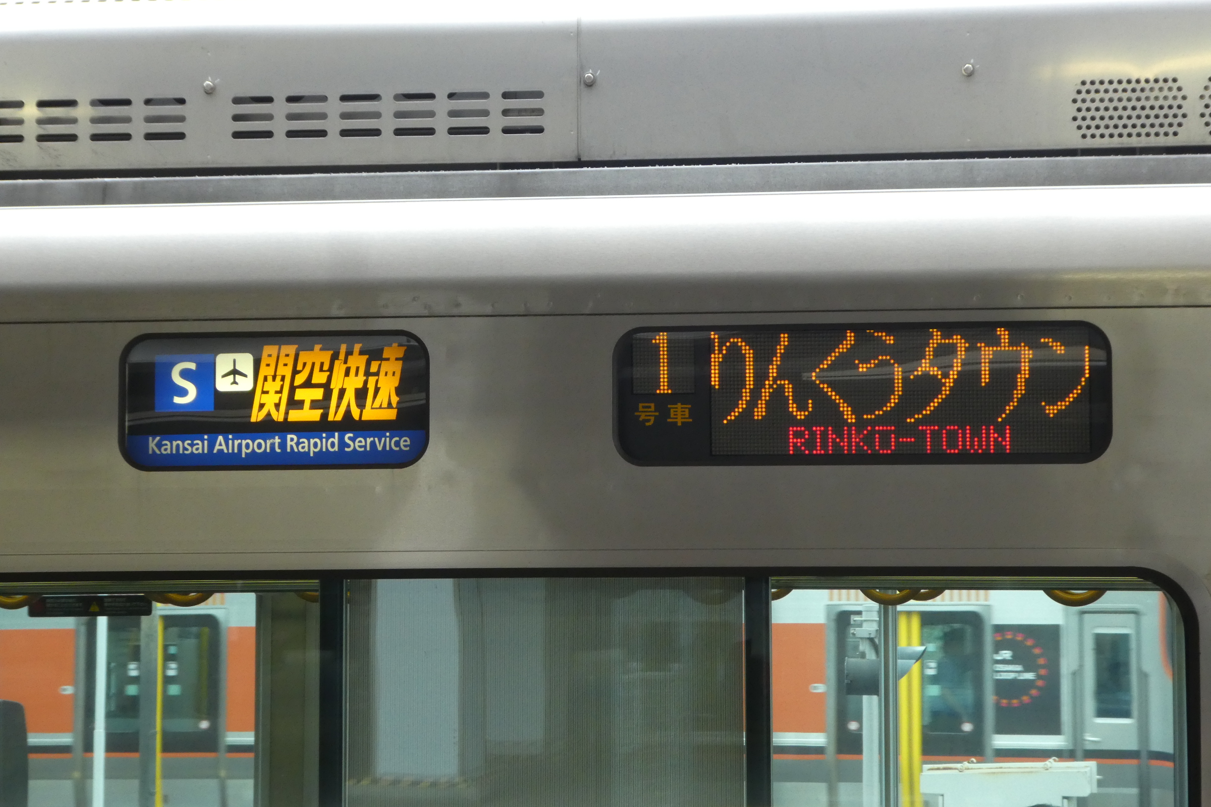 関西空港連絡橋被災により、りんくうタウン行きとなっている関空快速。